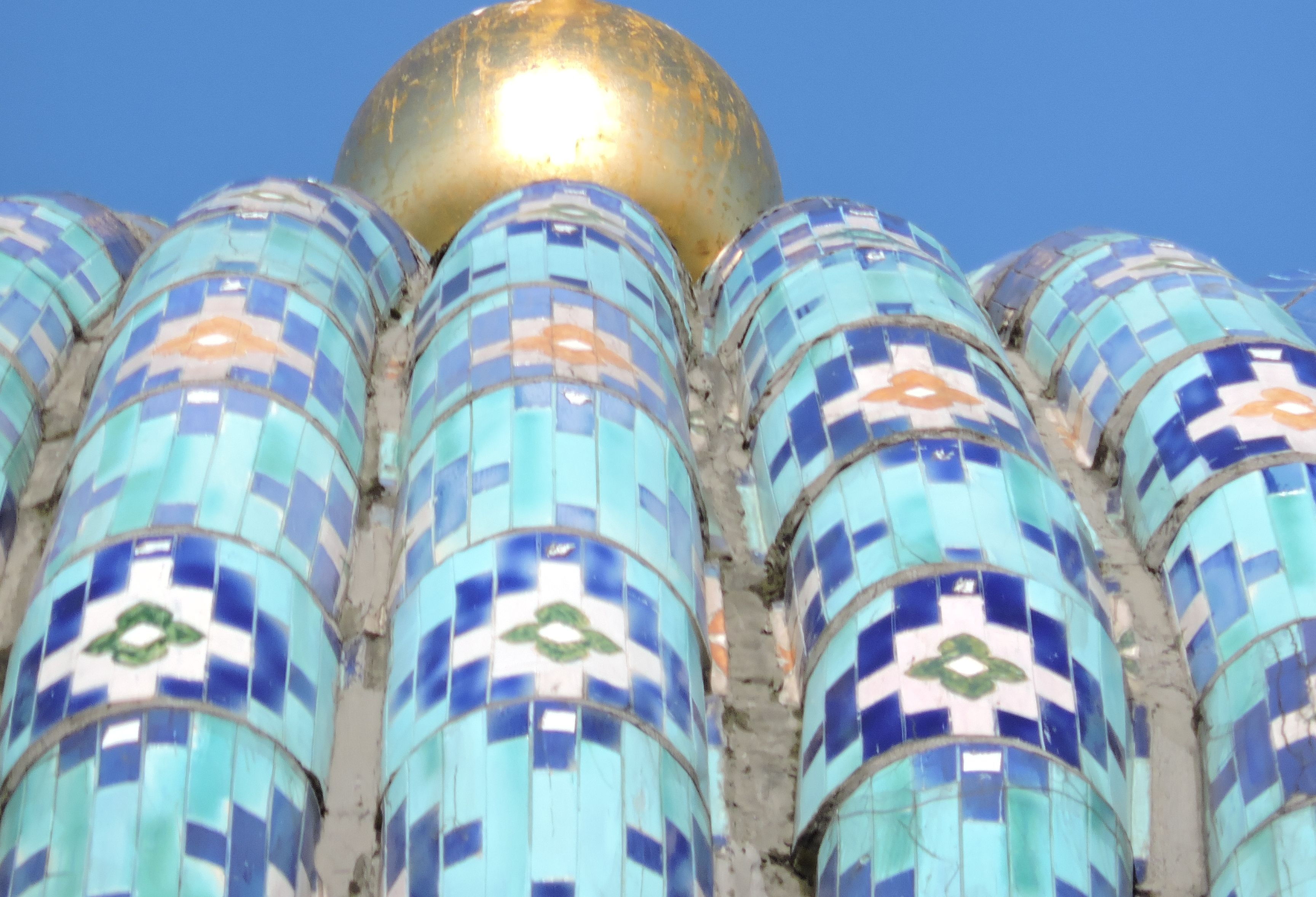 Орнамент купола Соборной мечети